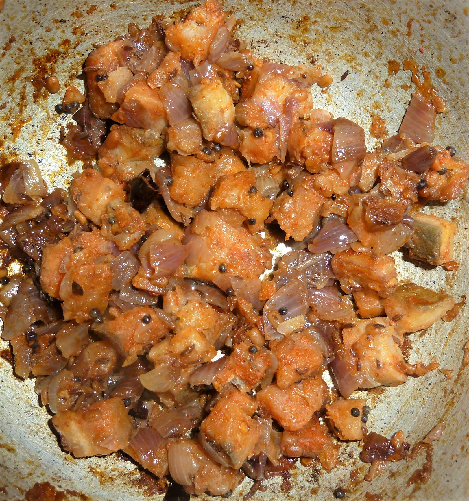 అరటికాయ ఉల్లిపాయ పోపు కూర